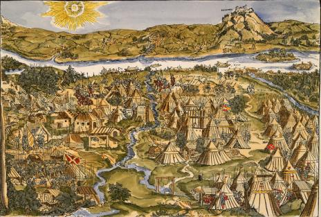 Belagerung Wiens 1529, zeitgenössischer kolorierter Holzschnitt